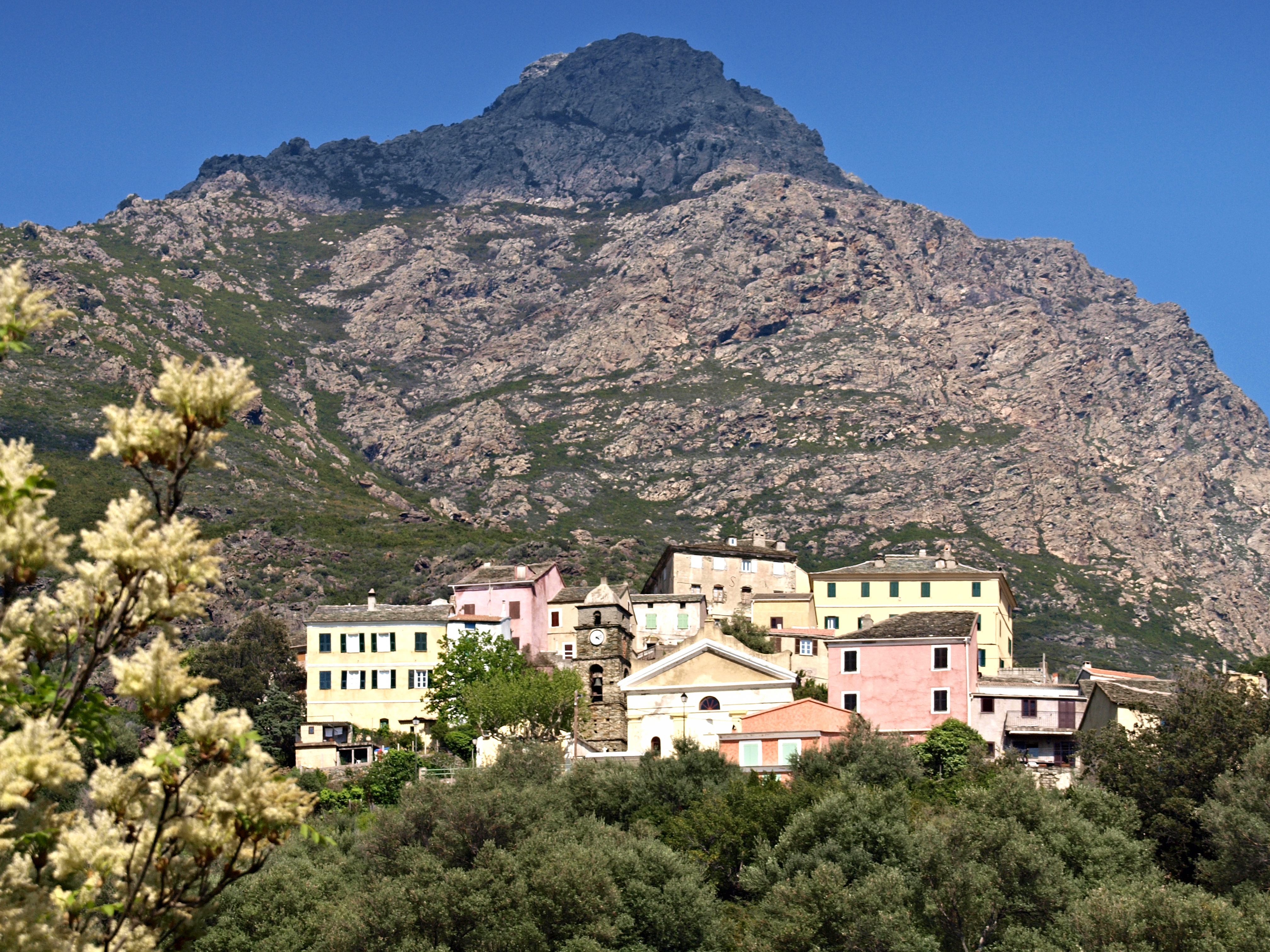 Ogliastro (Corsica) - Vue du village